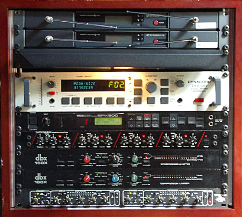 Siderack mit Effektgeräten und Funkempfängern